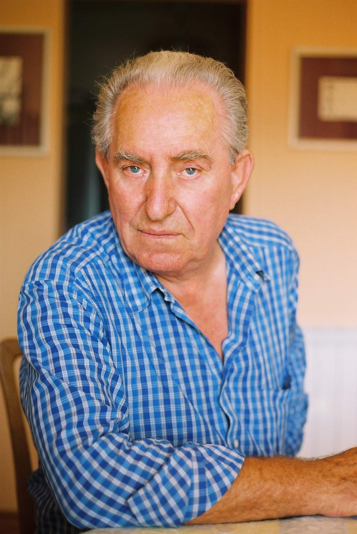 Slobodan Puro Đurić (Cetinje, 1935) crnogorski slikar